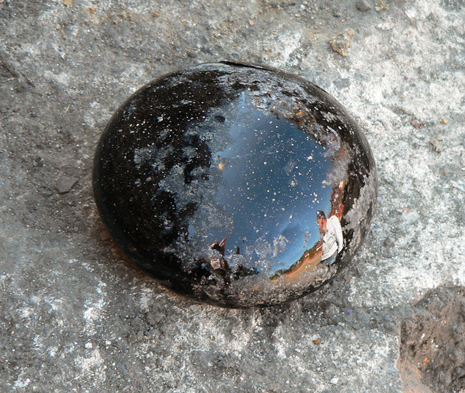 Auf der Glashütte Klein Süntel ausgegrabenes Glättglas